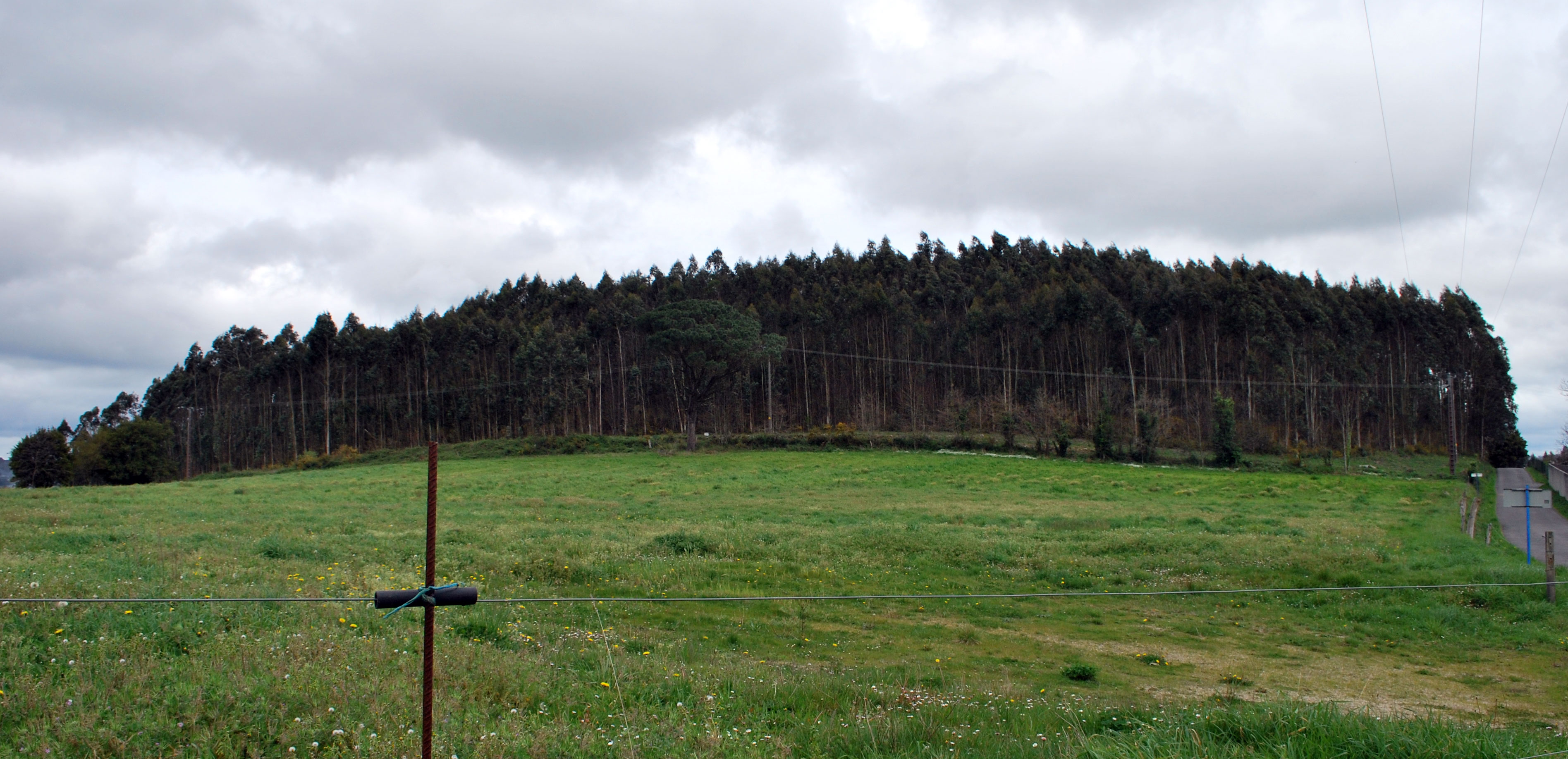 Vista do castro de Montesclaros na Laracha A Coruña Galiza Spain